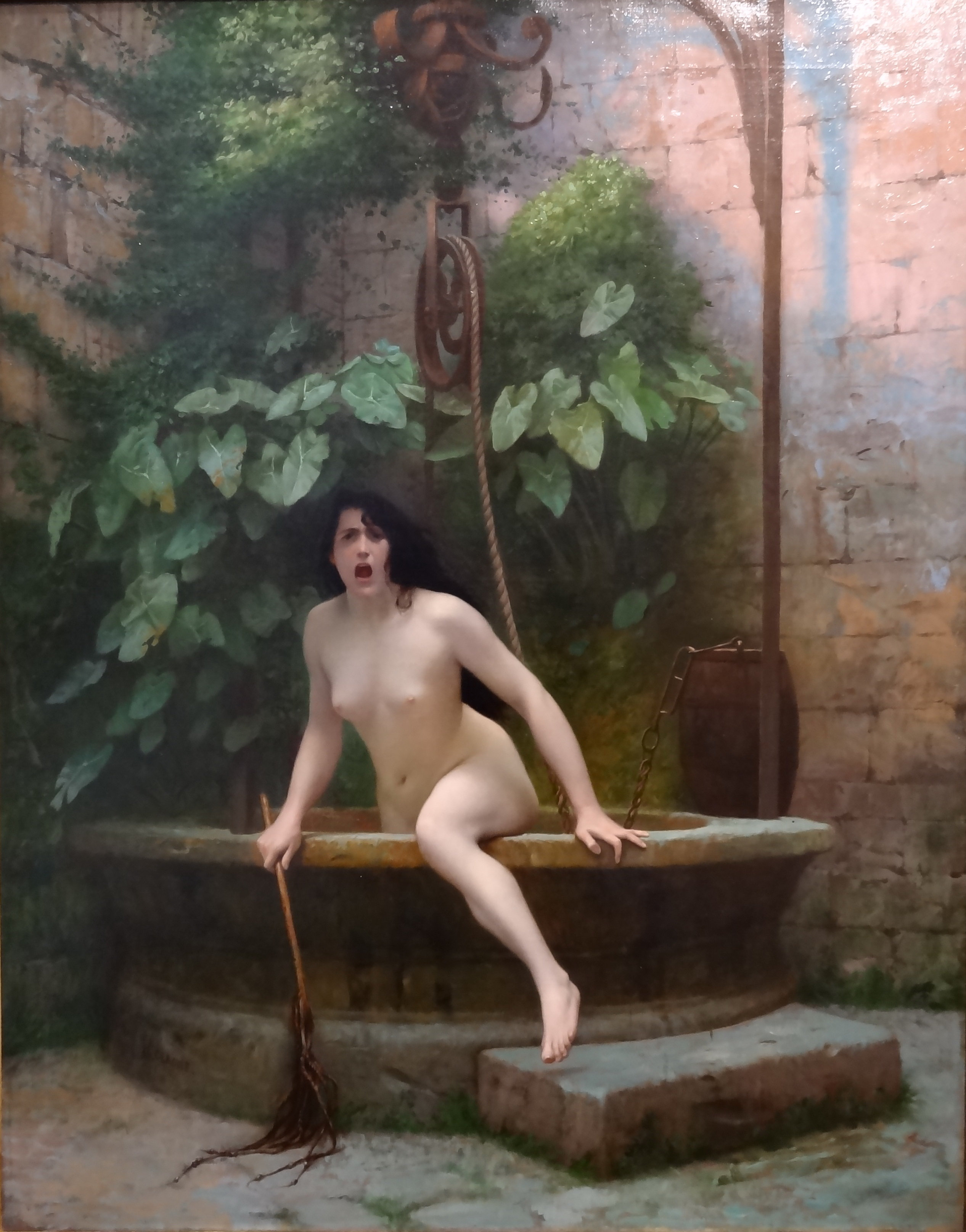 Одно из последних значительных полотен мастера.